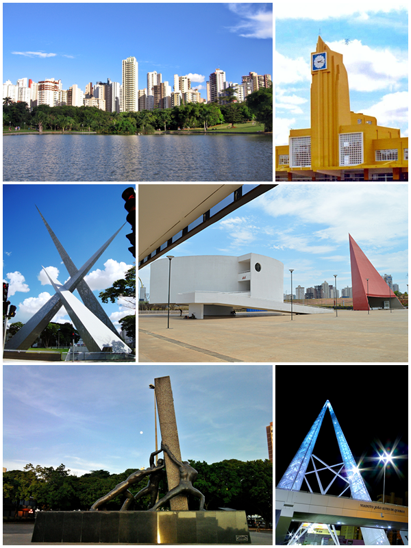 Montagem de fotos de Goiânia